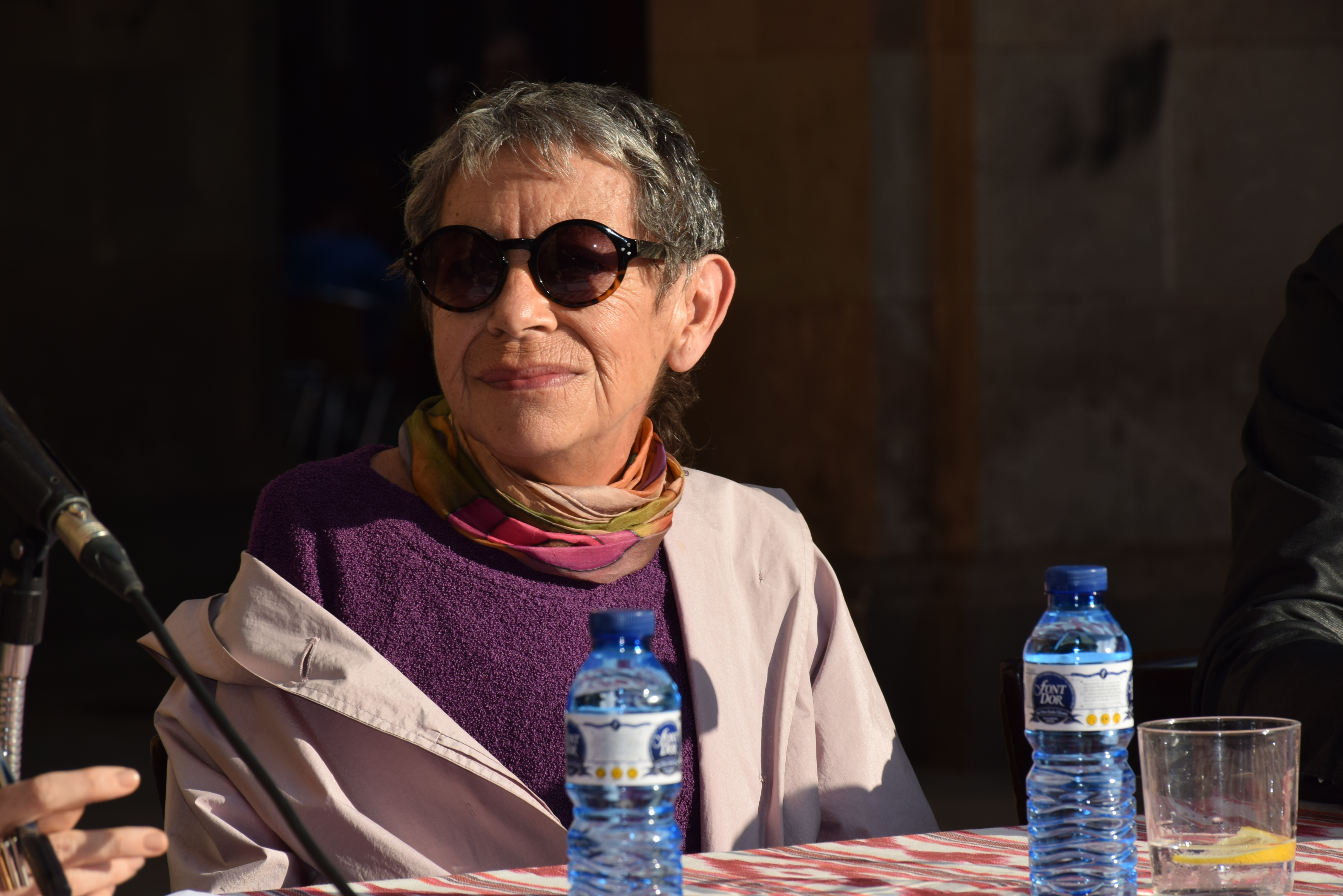 Conversa Maria Antònia Oliver - Jordi Cuixart